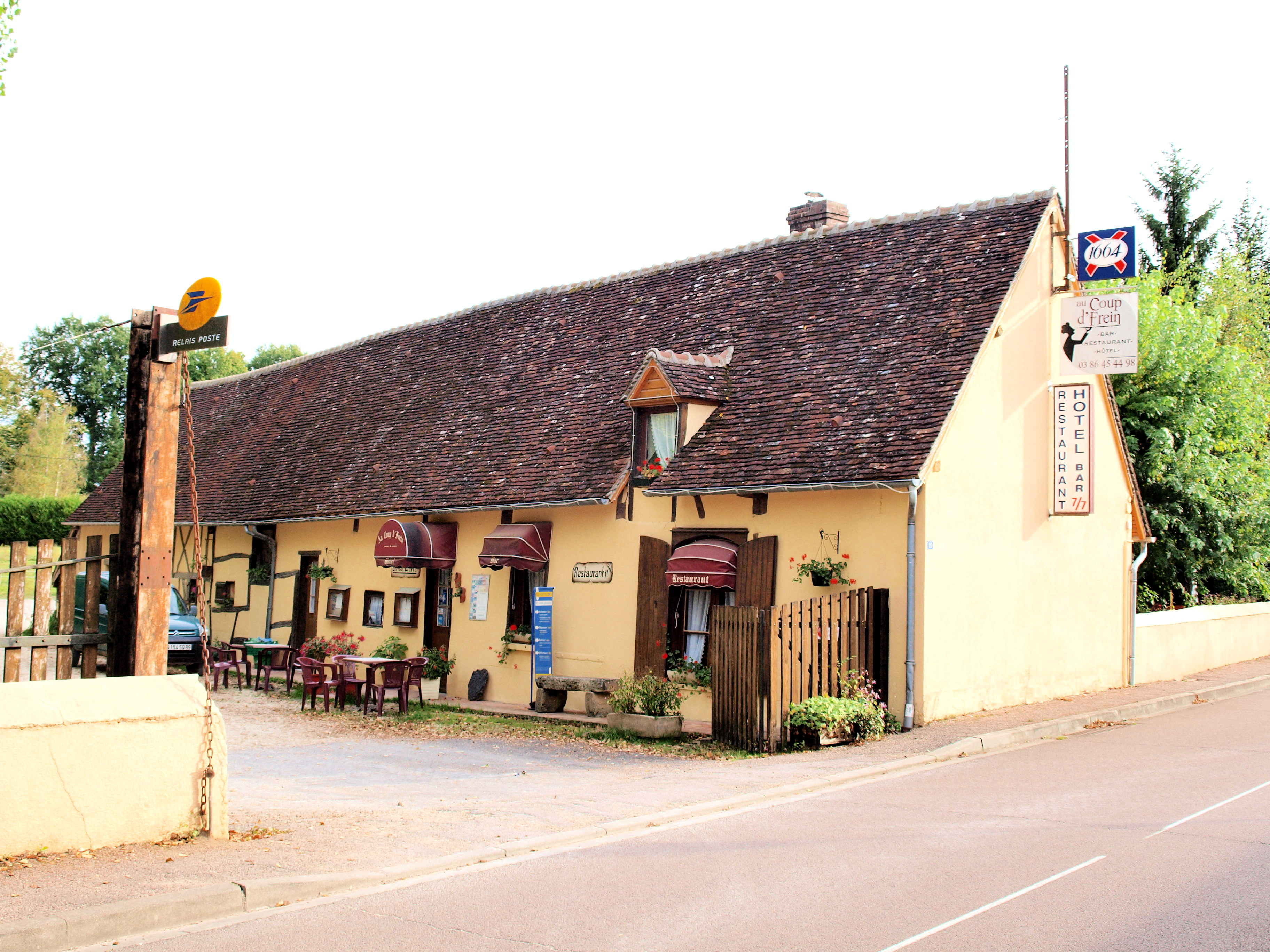 Tannerre-en-Puisaye (Yonne, France) ; hotel-restaurant & agence postale.